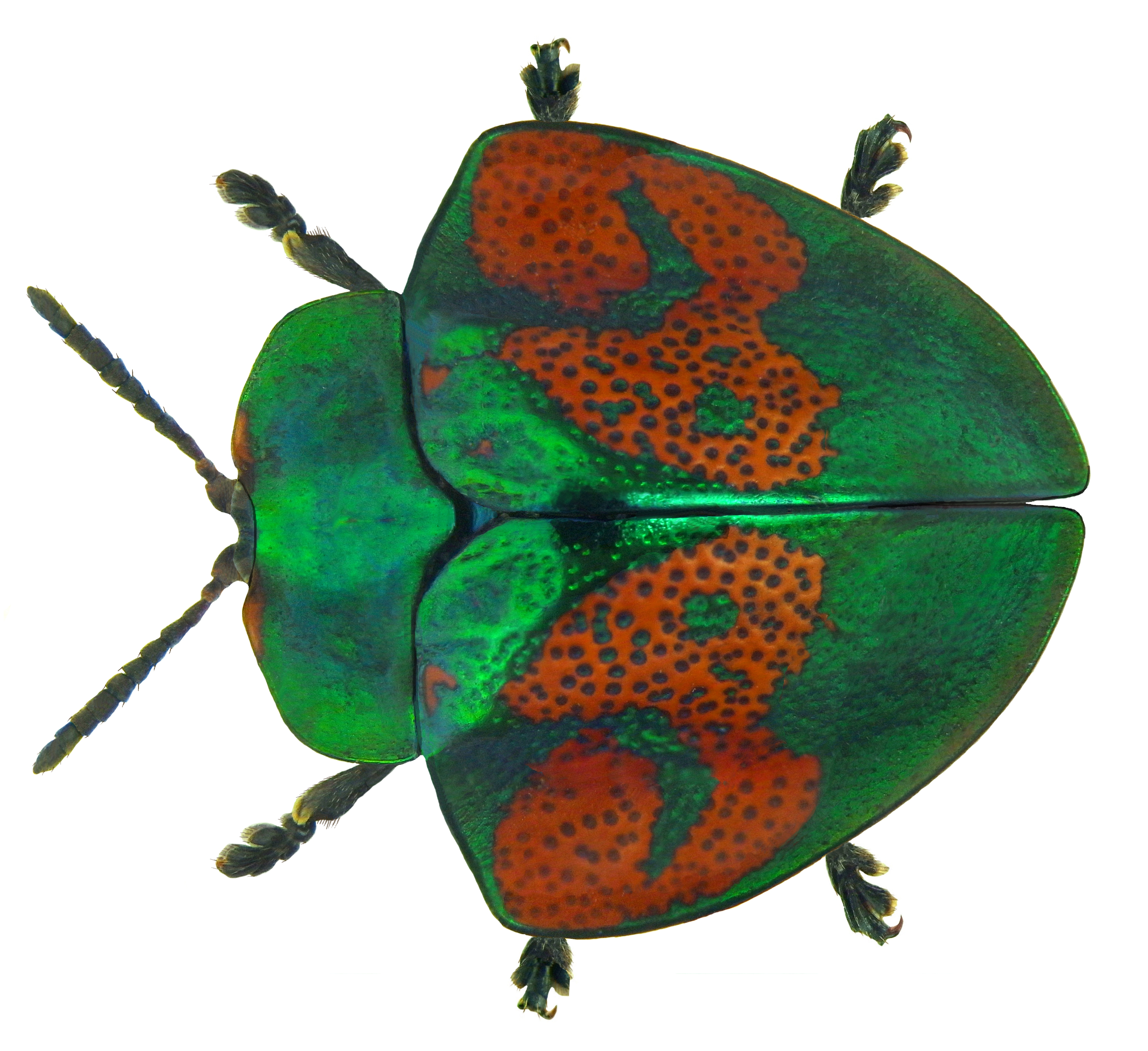 Stolas discoides (Linné, 1758) Familie: Chrysomelidae Groesse: 12 mm Fundort: Peru, Salvacion, Rio Alto de Dios, Manu Park, 500 m leg. III.1997; det. L.Borowiec, 2010 Photo: U.Schmidt, 2012